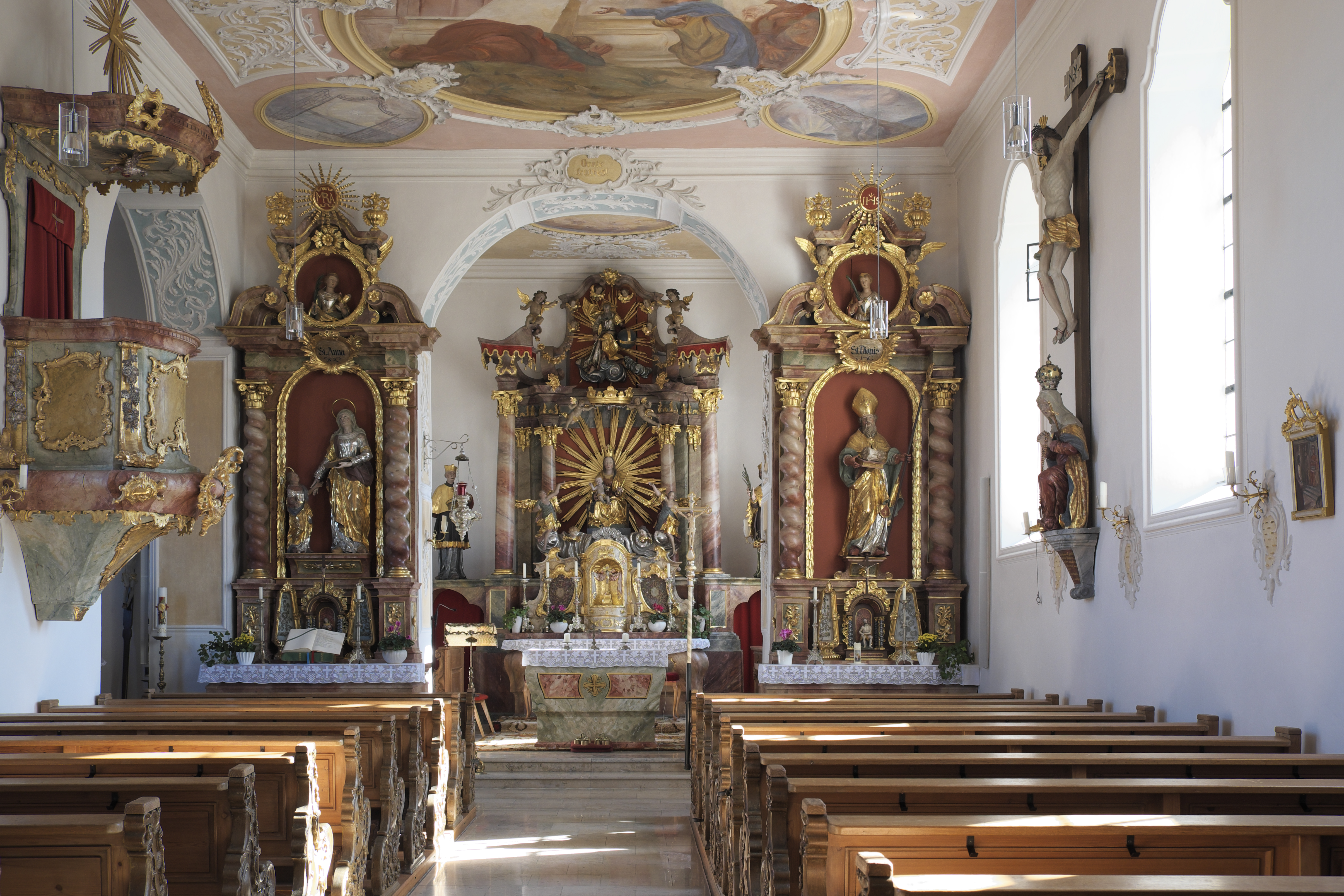 Katholische Filialkirche Mariä Himmelfahrt in Unterschweinbach (Egenhofen) im Landkreis Fürstenfeldbruck (Bayern/Deutschland)